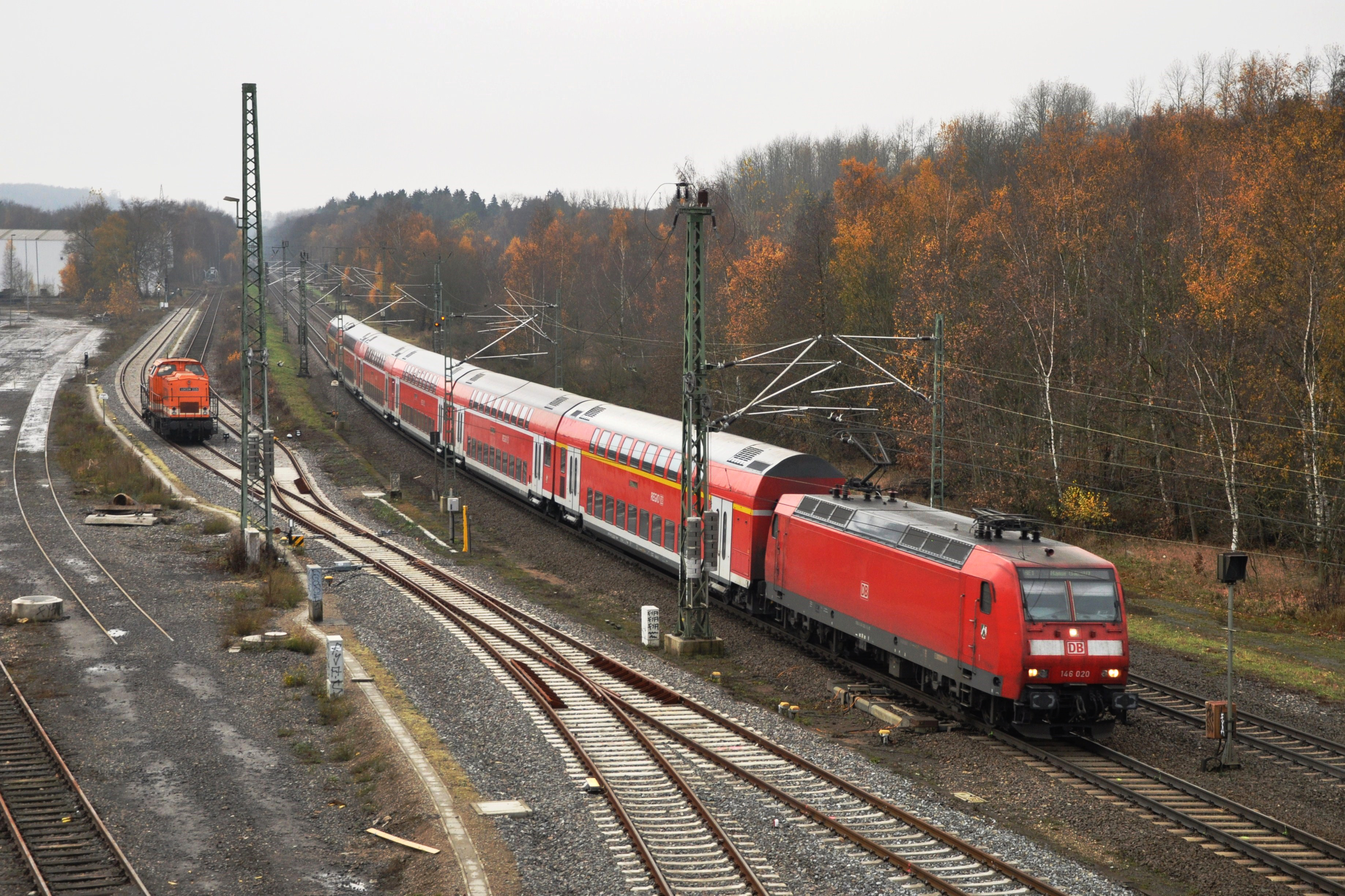 Der Nordrhein-Westfalen-Express nach Hamm passiert bei der Einfahrt in den Hauptbahnhof von Stolberg im Spätherbst 2012 die Lokomotive 215 der LOCON Logistik. // The Northrhine-Westphalia-Express direction Hamm passes by the LOCON Logistics engine 215 while approaching Stolberg Hbf in late autumn 2012.